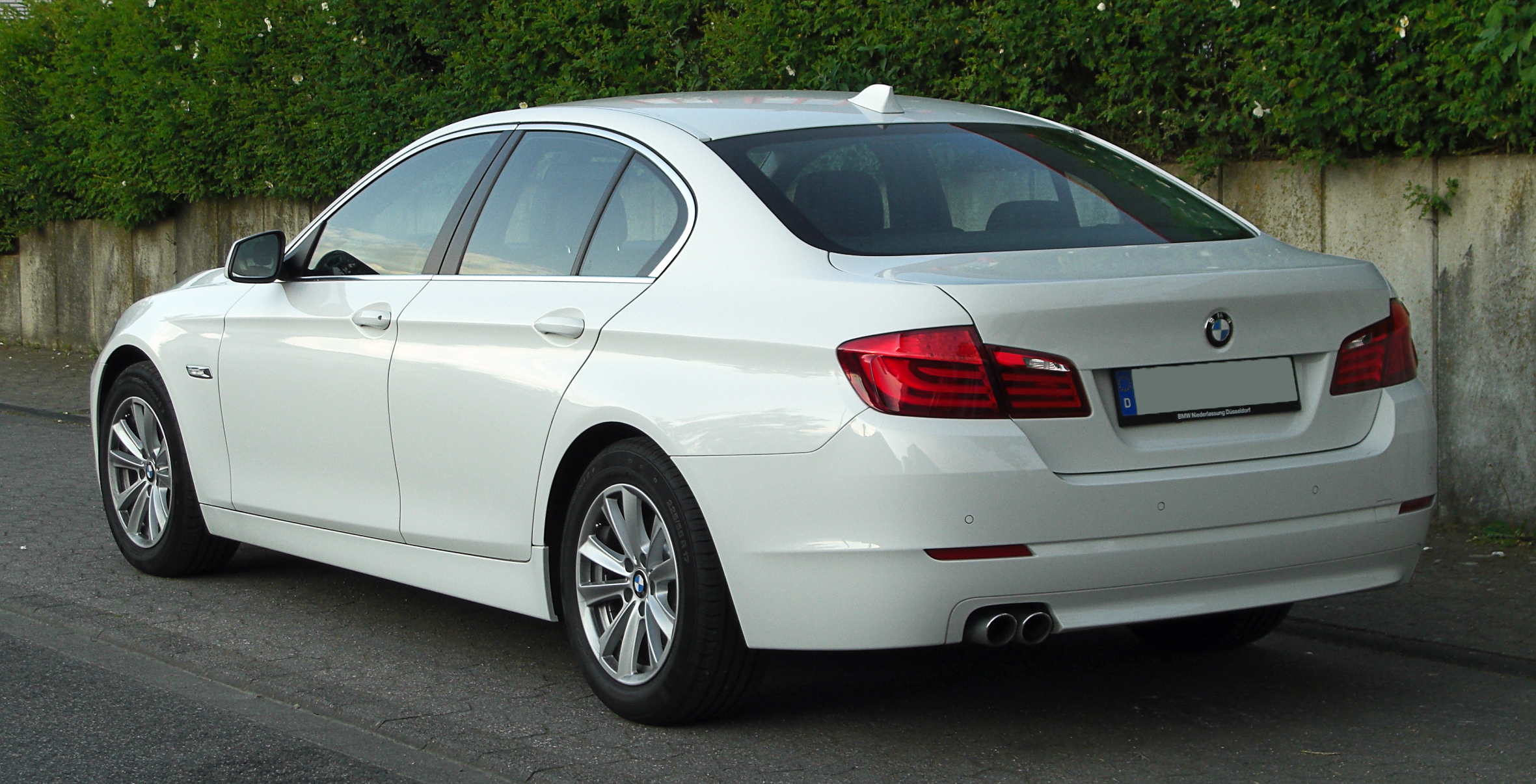 BMW 5er (F10)